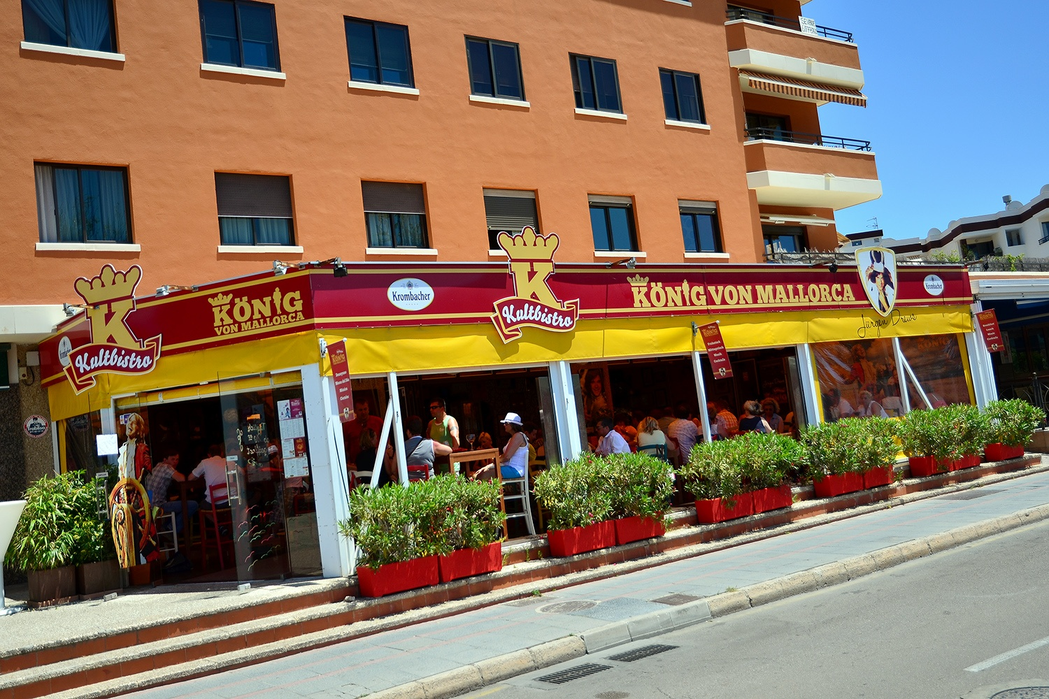 König von Mallorca - Kultbistro von Jürgen Drews in Santa Ponça, Mallorca